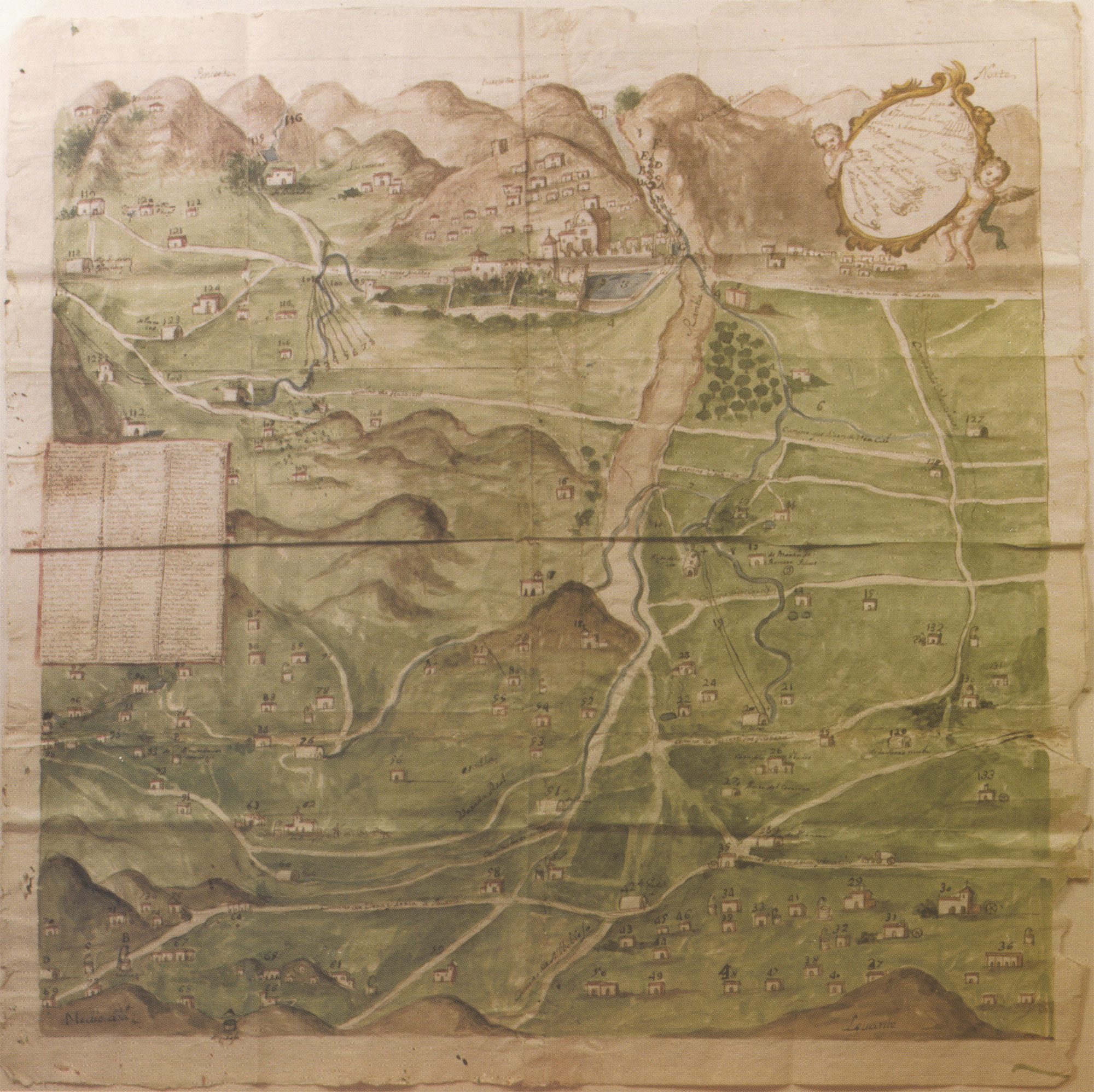 Paño Pintado con representación de los aprovechamientos del agua de la Rambla de Nogalte